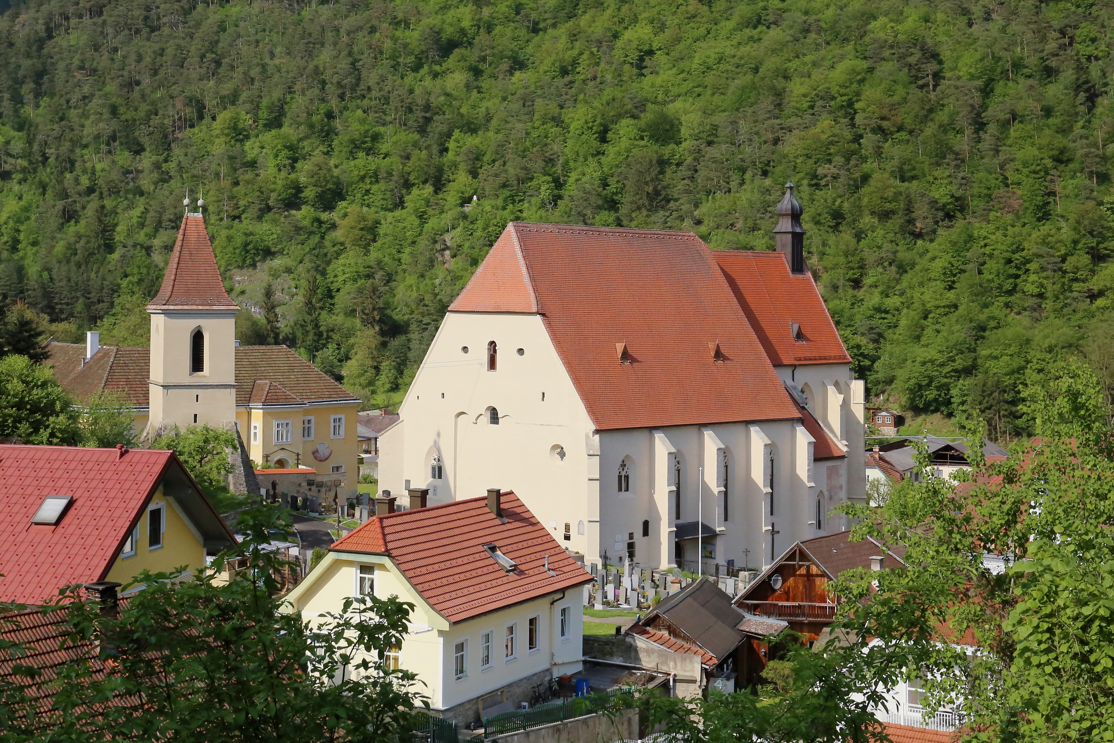 Katholische Pfarrkirche hl. Stephanus und freistehender Glockenturm in der niederösterreichischen Marktgemeinde Weiten.